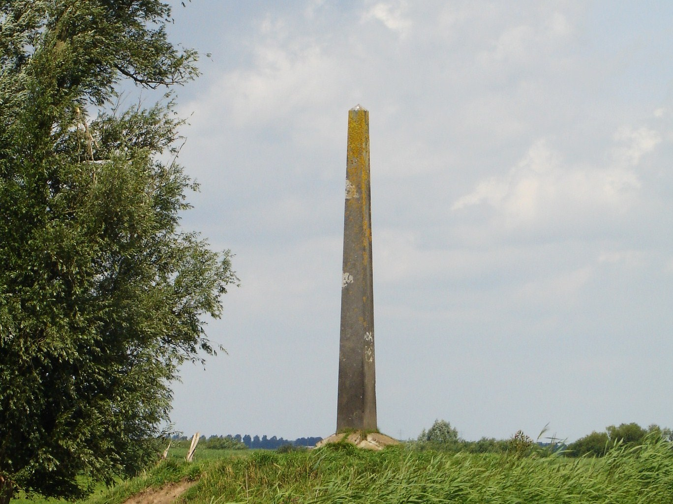 Obelisk Baron Haersolte van Haerst in de Mandjeswaard aan de oever van de Goot. 1881